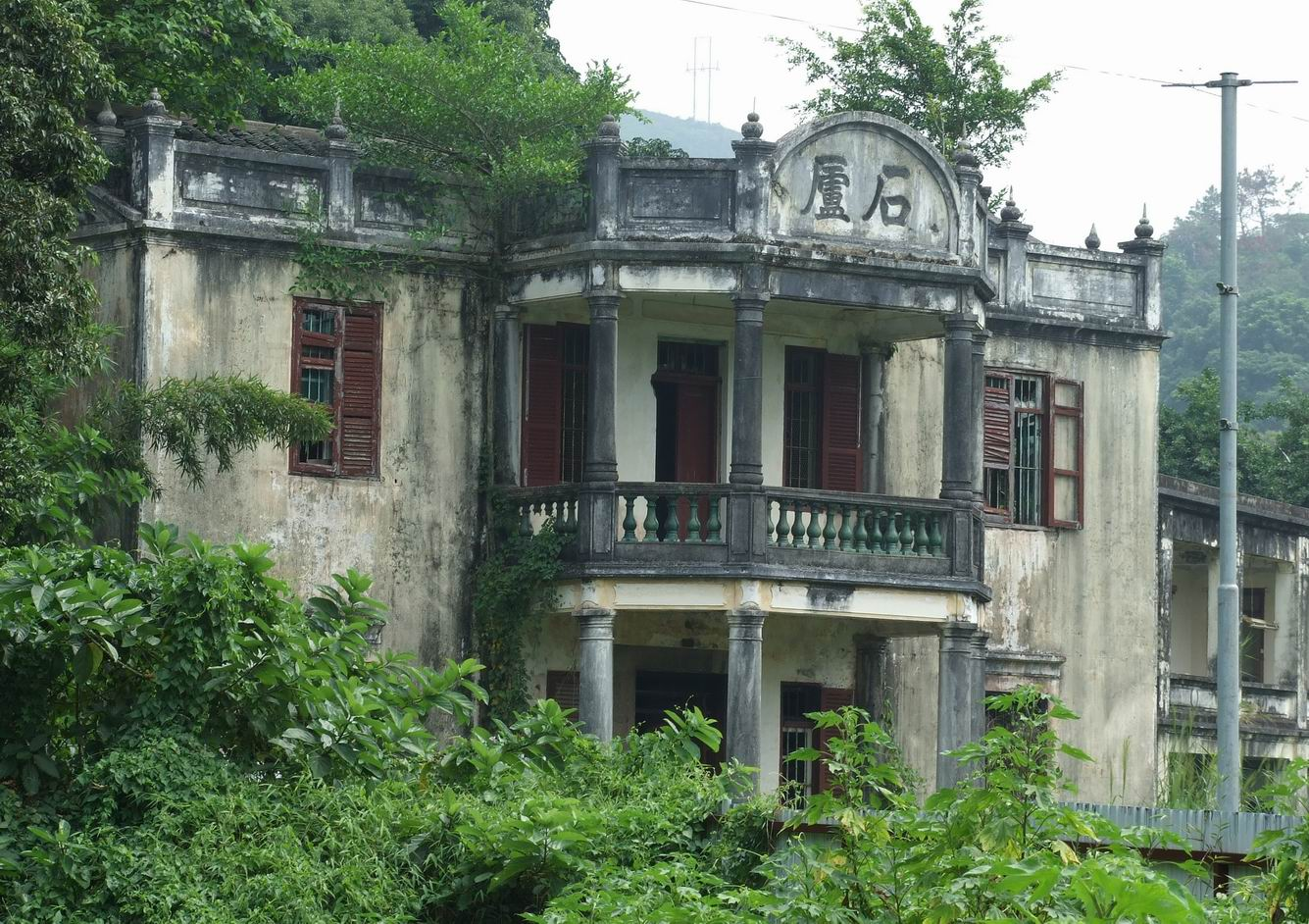 石廬